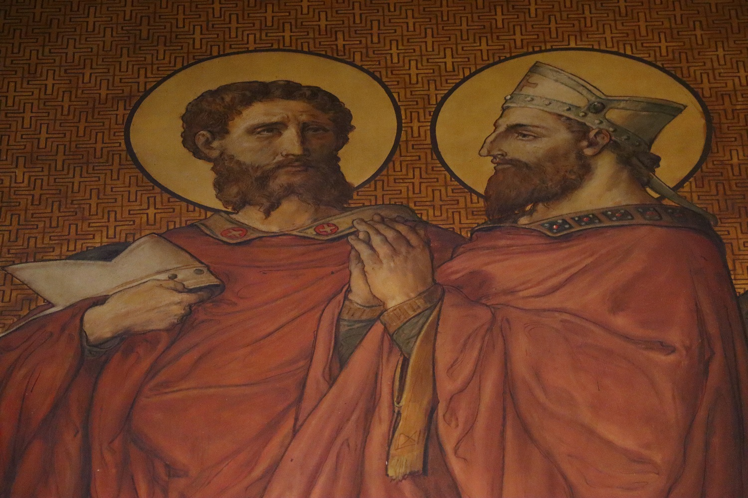 Saint Amand et Saint Melaine. Procession des saints de Bretagne. Diocèse de Rennes. Déambulatoire de la métropole Saint-Pierre de Rennes (35).